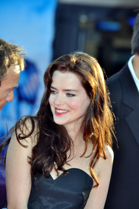 Roxane Mesquida au festival de Deauville pour le film Kaboom